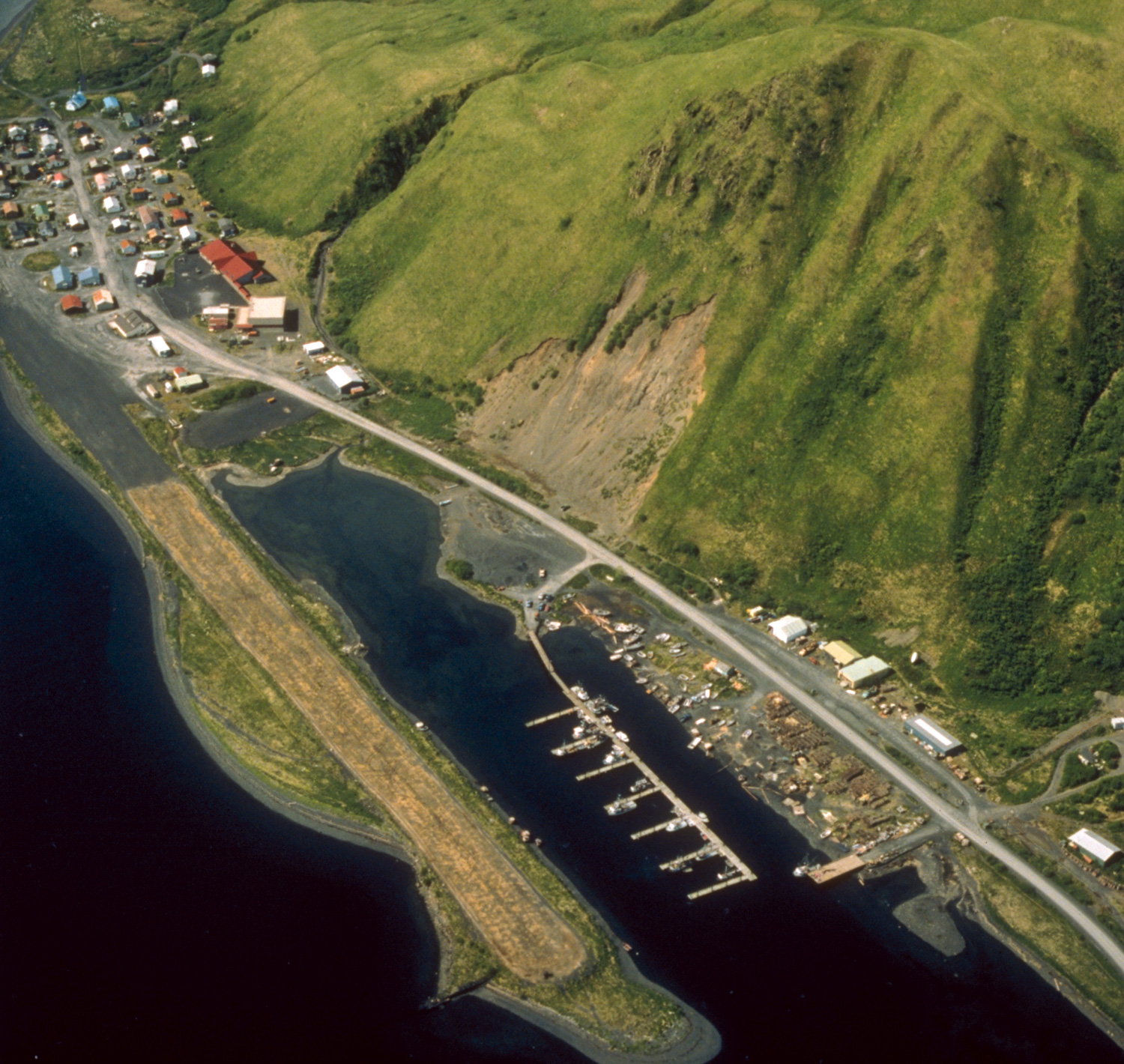 Aerial view of Old Harbor, Kodiak Island, Alaska, USA.